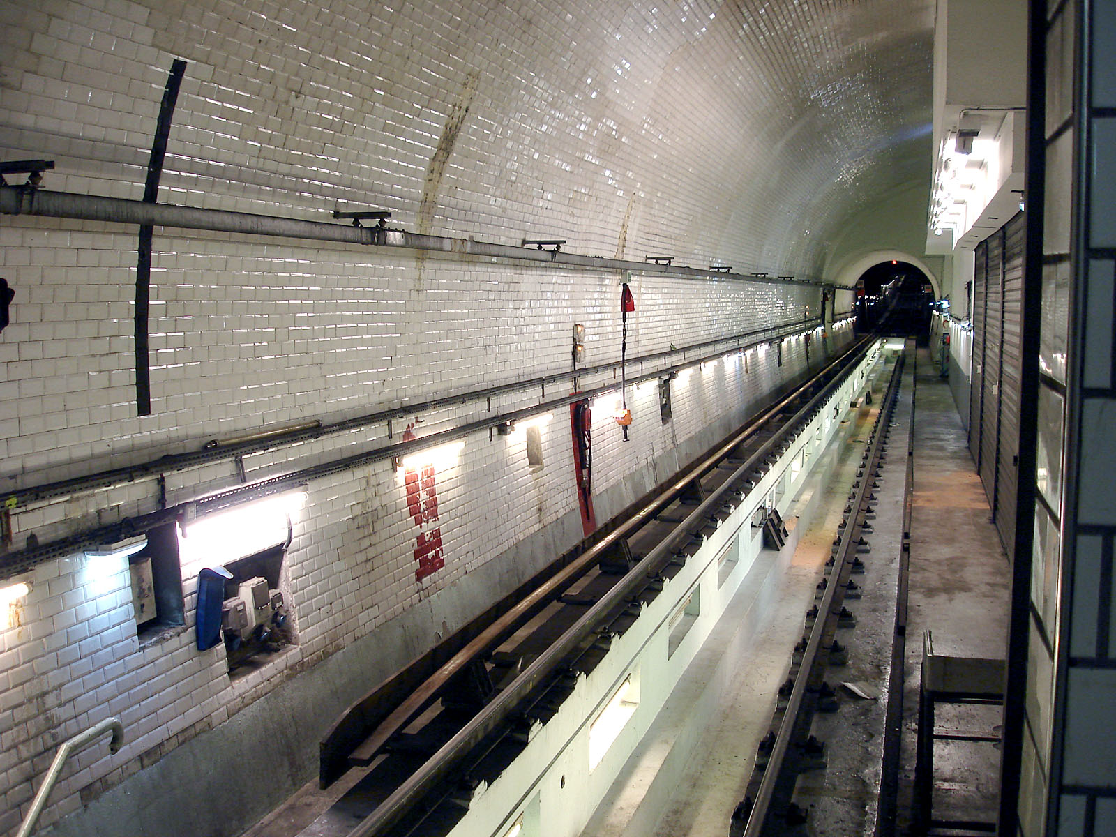 Station Pré-Saint-Gervais de la ligne 7 bis du métro de Paris, France.